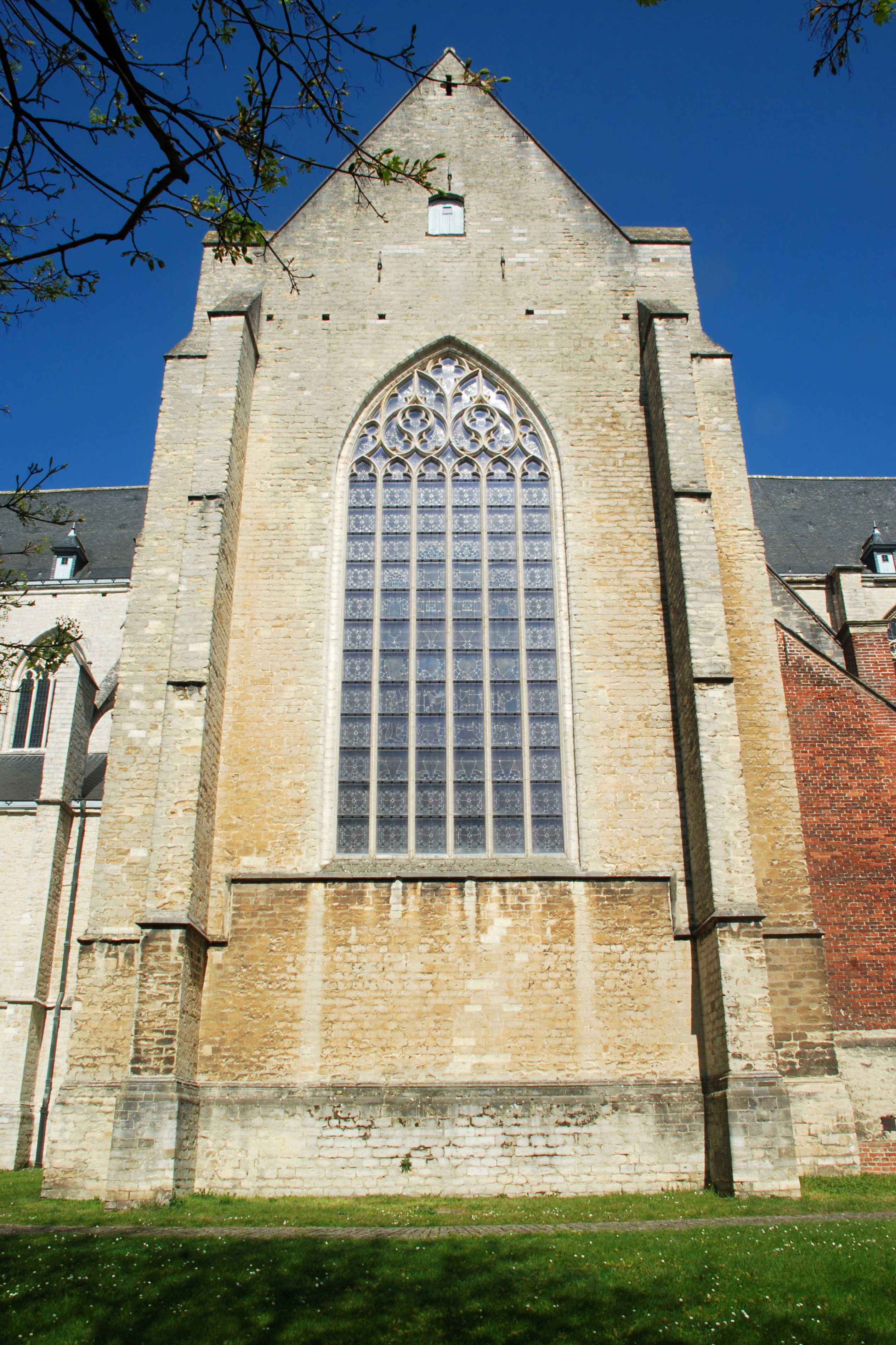 Belgique - Brabant flamand - Louvain - Église Saint-Quentin